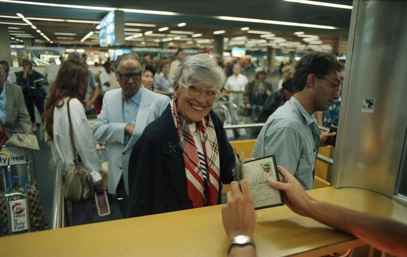 Bonn: TV - Frankfurt - Flughafen - Zoll Juni 1988